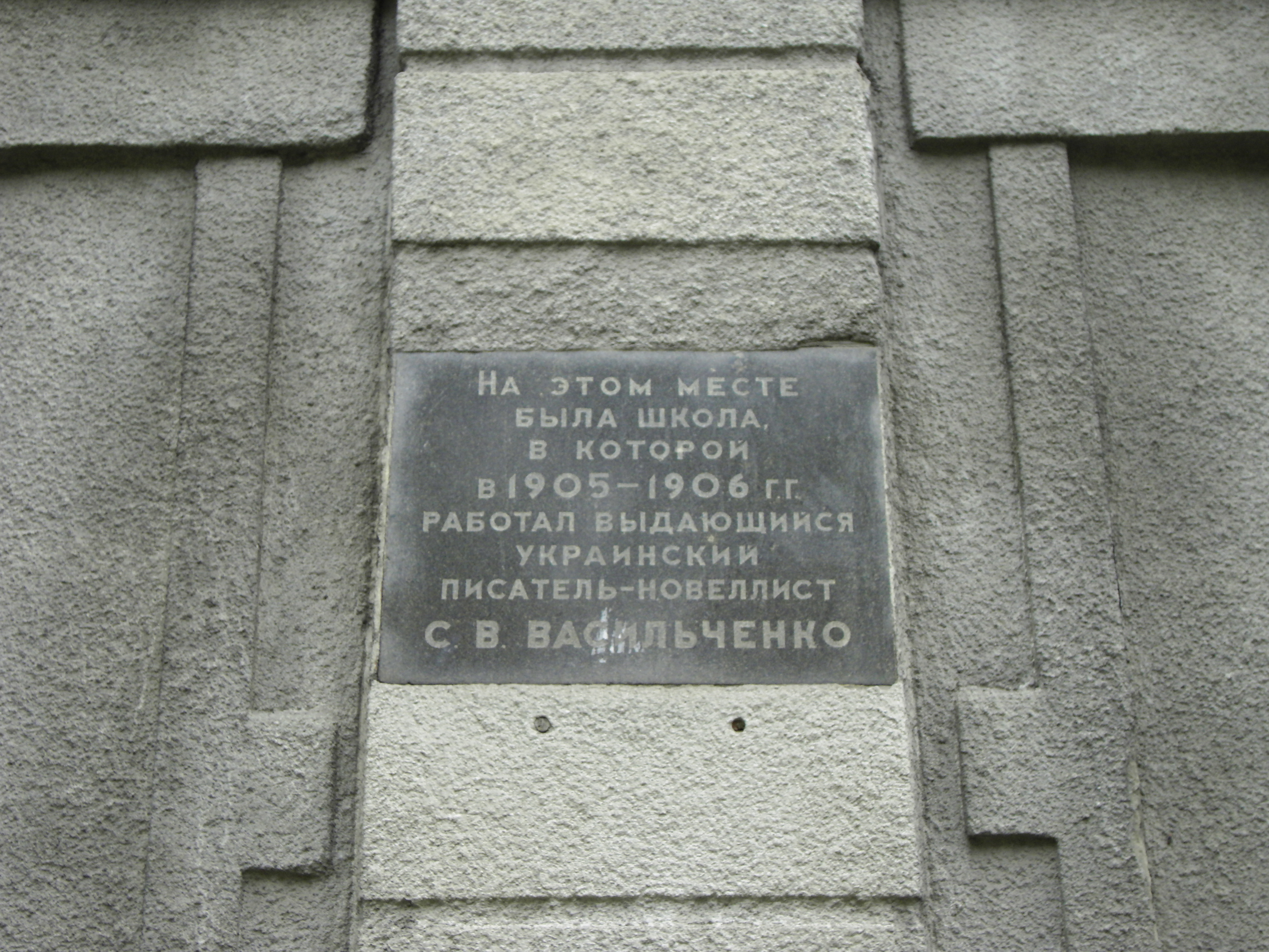 Пам'ятна дошка на місці школи, в якій працював видатний письменник С. В. Васильченко